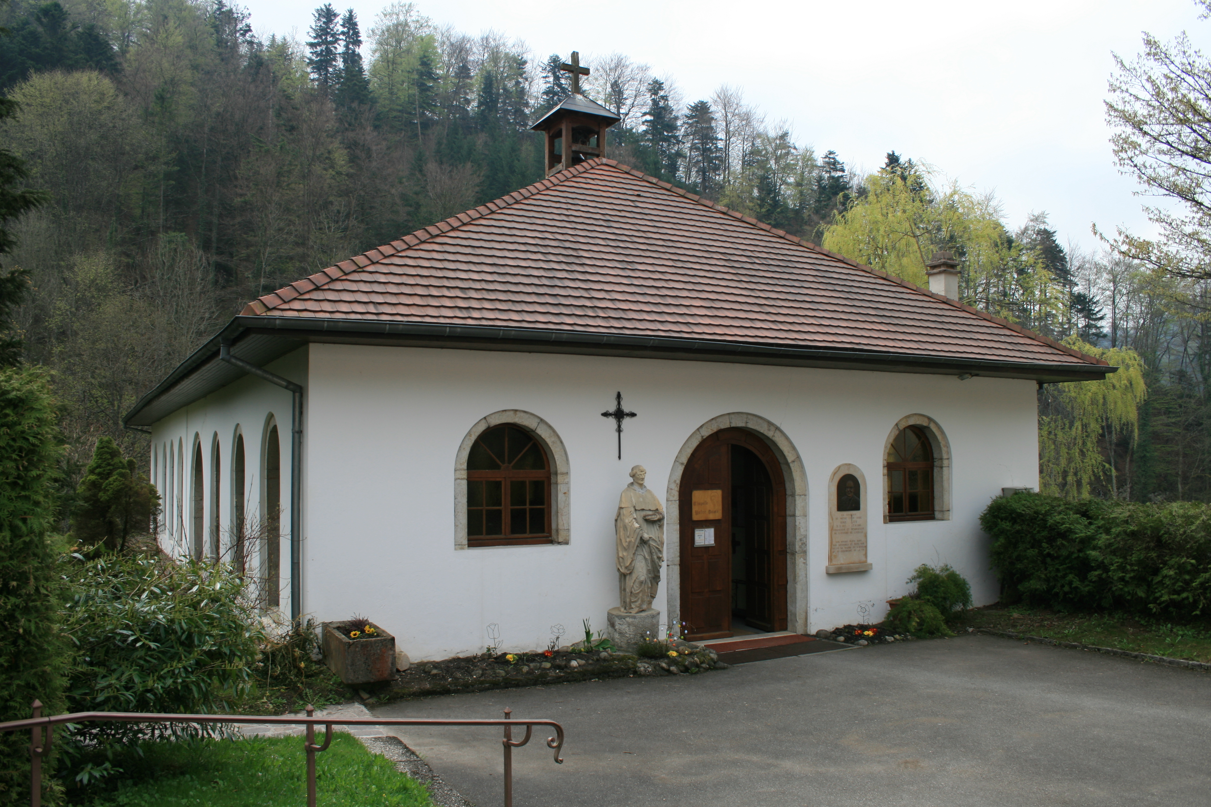 Chapelle de Lucelle, Alsace